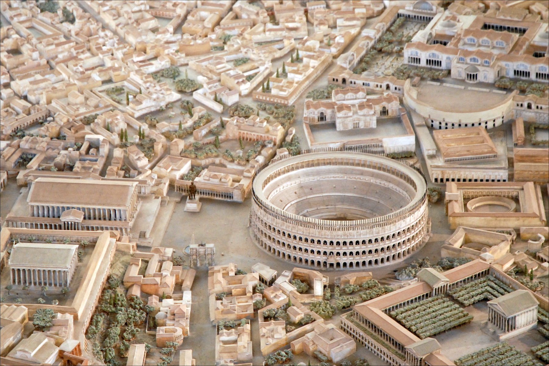 La maquette de Rome à l'époque de Constantin (306-337) réalisée par Italo Gismondi entre 1933 et 1937. Cette maquette de 200 m de long est présentée au musée de la civilisation romaine à l'EUR à Rome. Elle est à l'échelle 1/250.